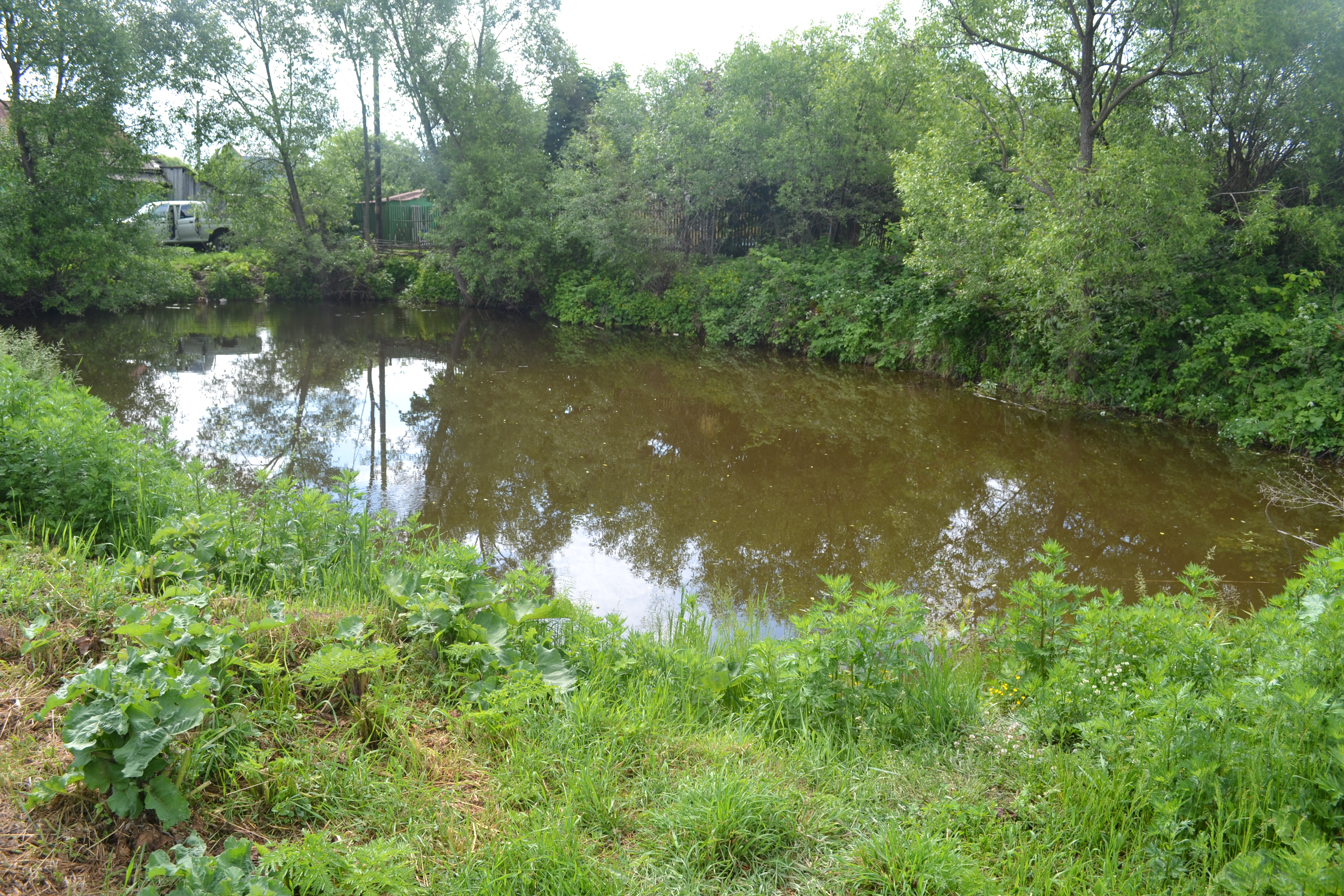 Пруд в деревне Ефремово (Шатурский район)